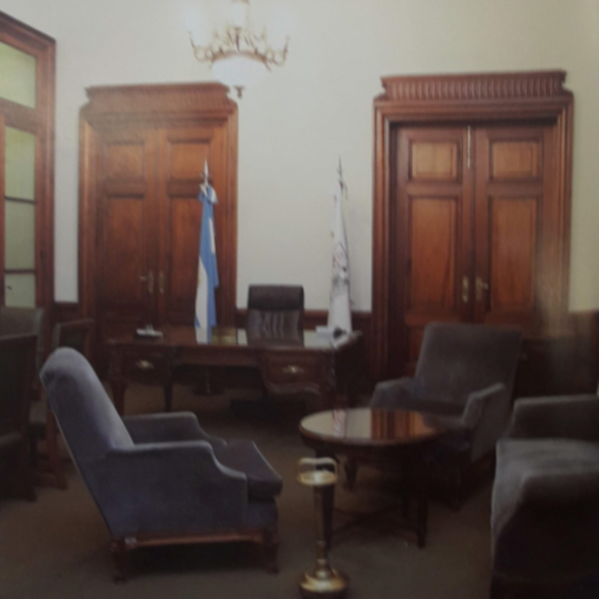 Presidencia de la Legislatura de Buenos Aires